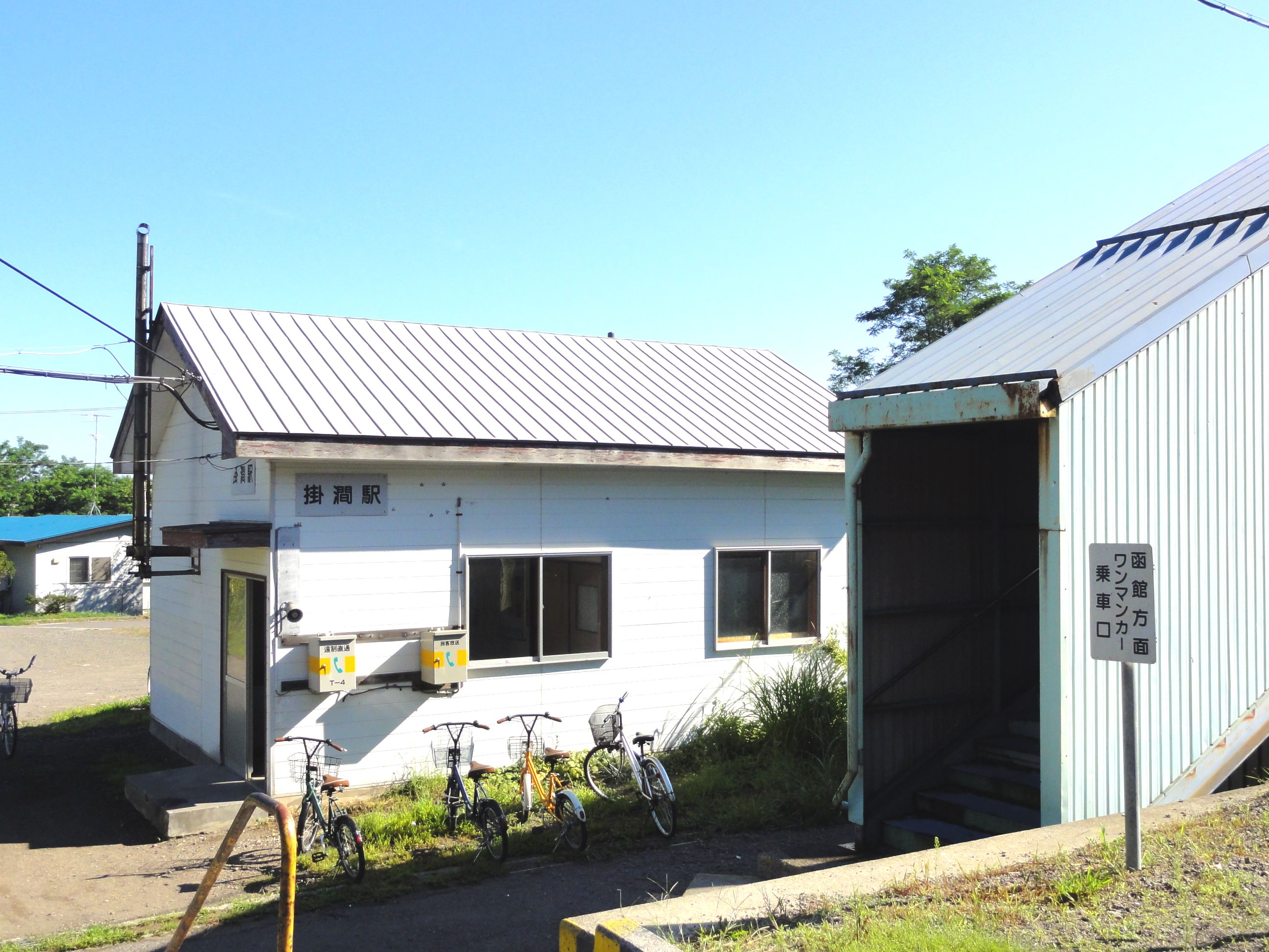 JR北海道掛澗駅待合室